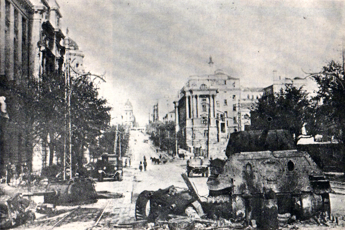 Srpski (latinica): Bojište nakon bitke u ulici Kneza Miloša oktobra 1944.